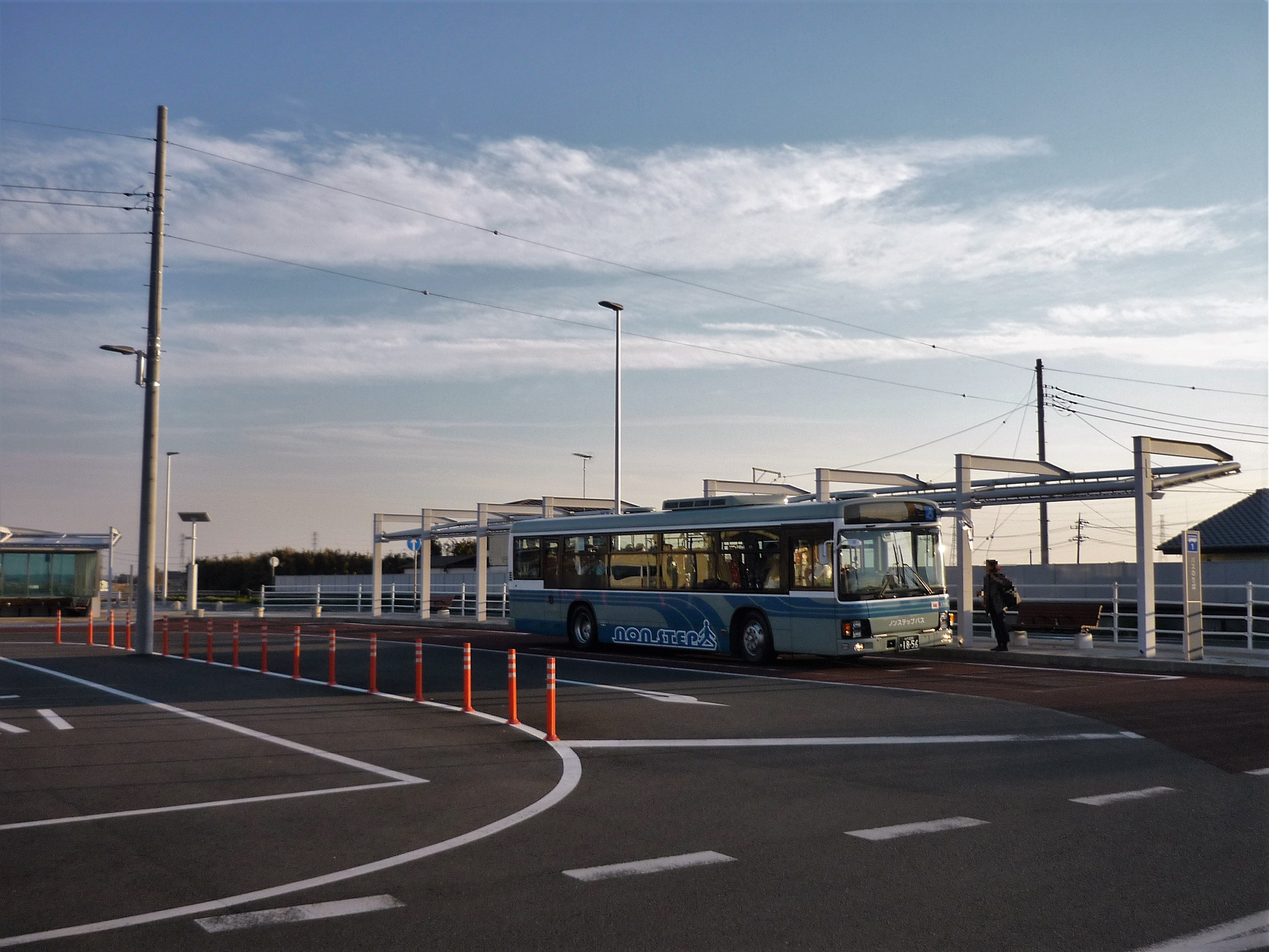 小川駅バスターミナル（常陸小川駅跡） Panasonic Lumix DMC-FS3